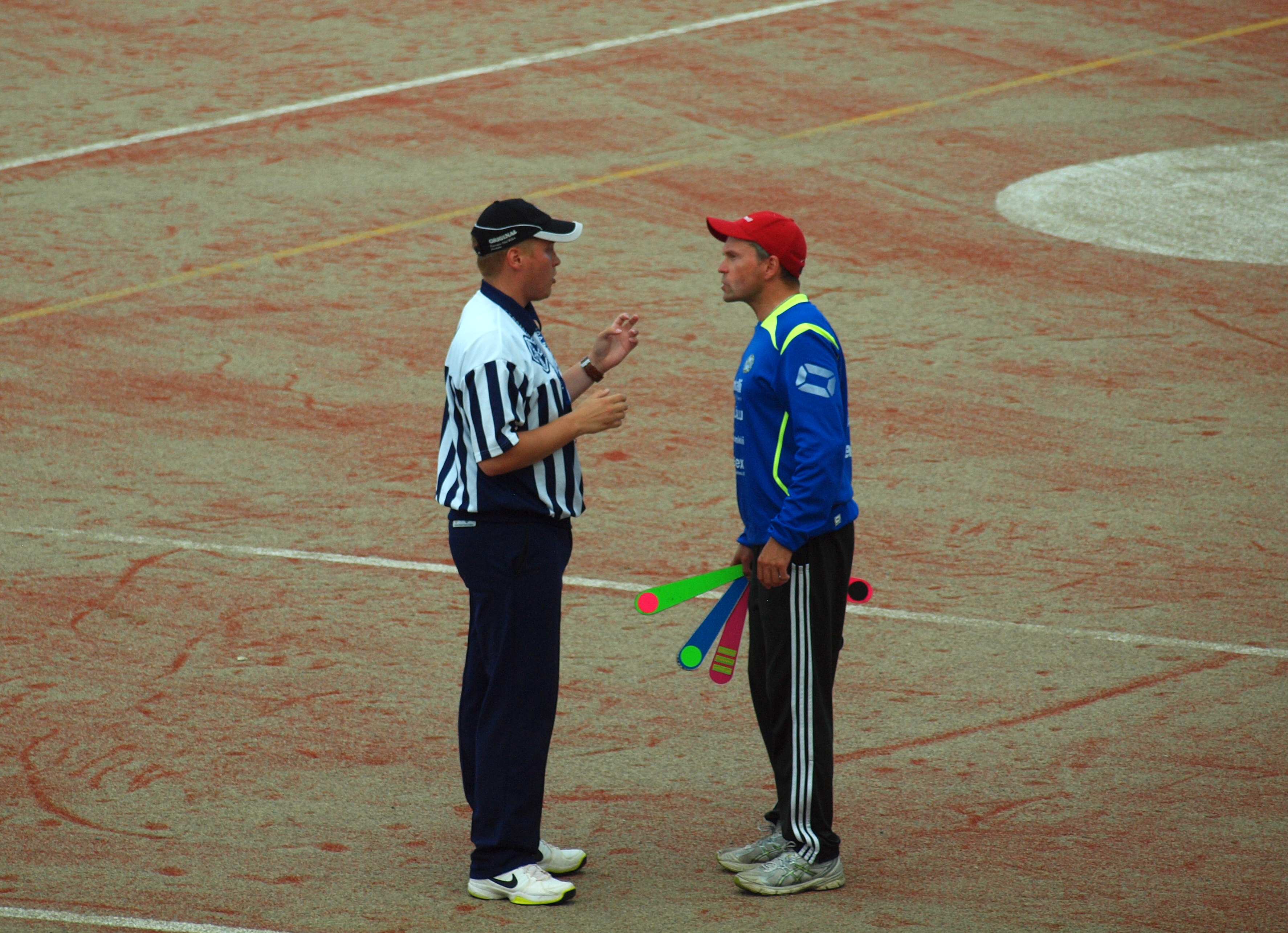 Alajärven Ankkurit - Vimpelin Veto pesäpallo-ottelu 10.8.2014. Kuvassa Ankkureiden pelinjohtaja Matti Iivarinen keskustelee päätuomarin kanssa.